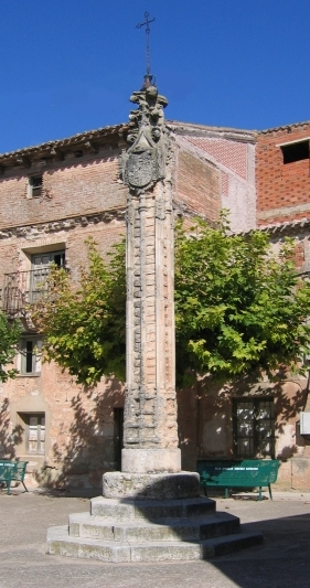 Rollo de Presencio. Foto tomada por Sanbec